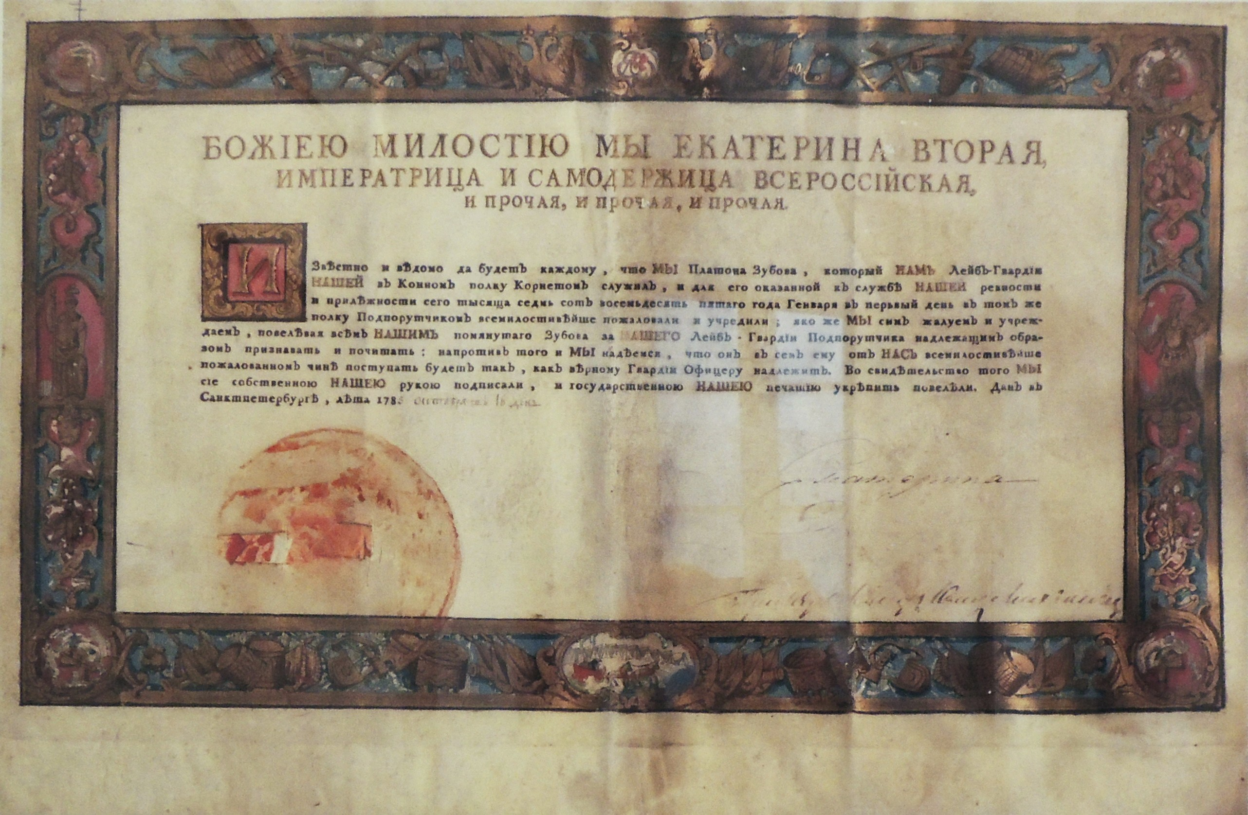 Приказ Екатерины Великой